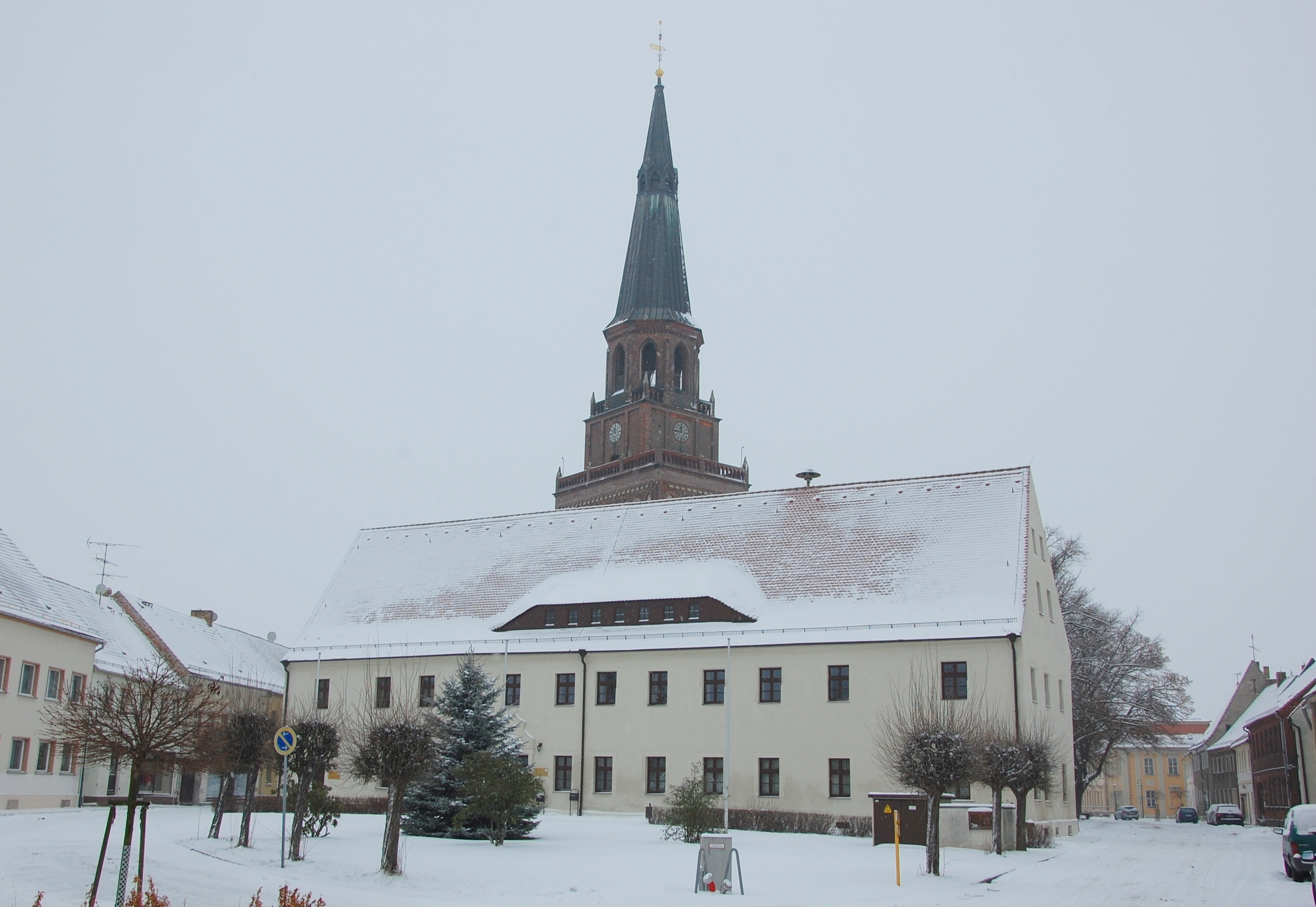 Haus Hohe Straße 47 in Prettin